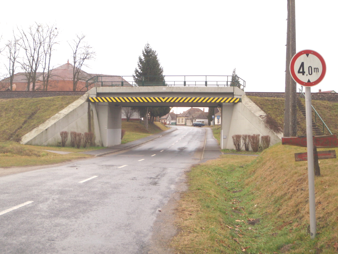 Győrvár vasúti aluljáró a Szombathely-Nagykanizsa vasútvonalon